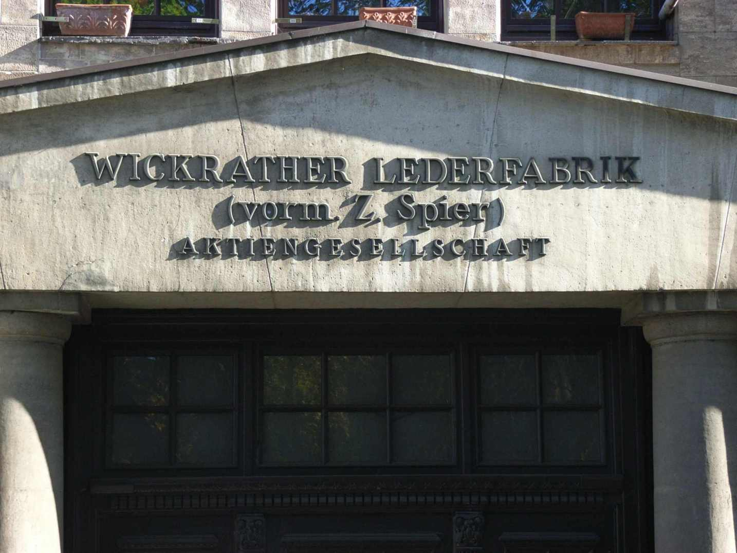 Wickrather Lederfabrick, Eingang des (ehem.) Verwaltungsgebäudes